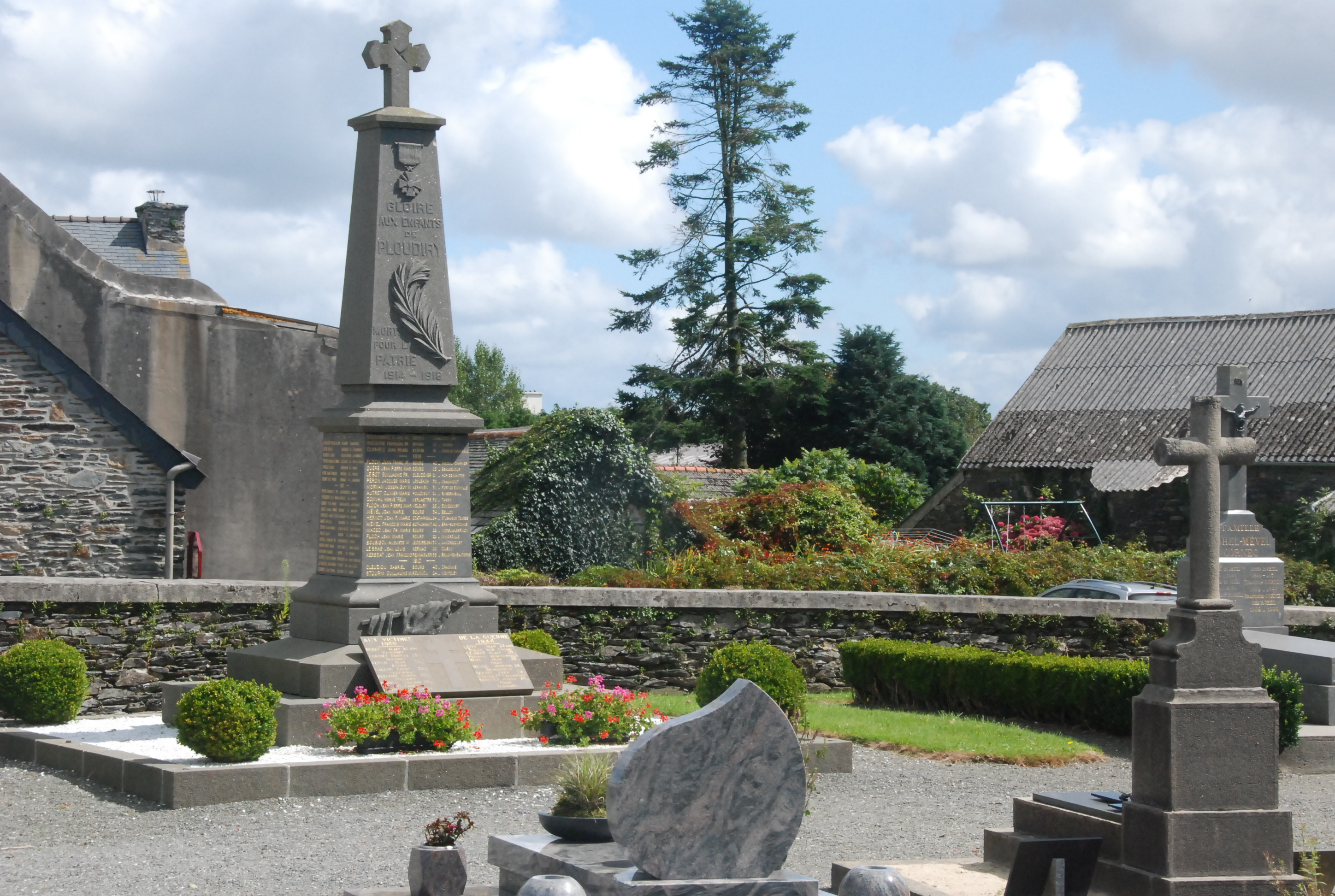 Monument aux morts - Ploudiry-29